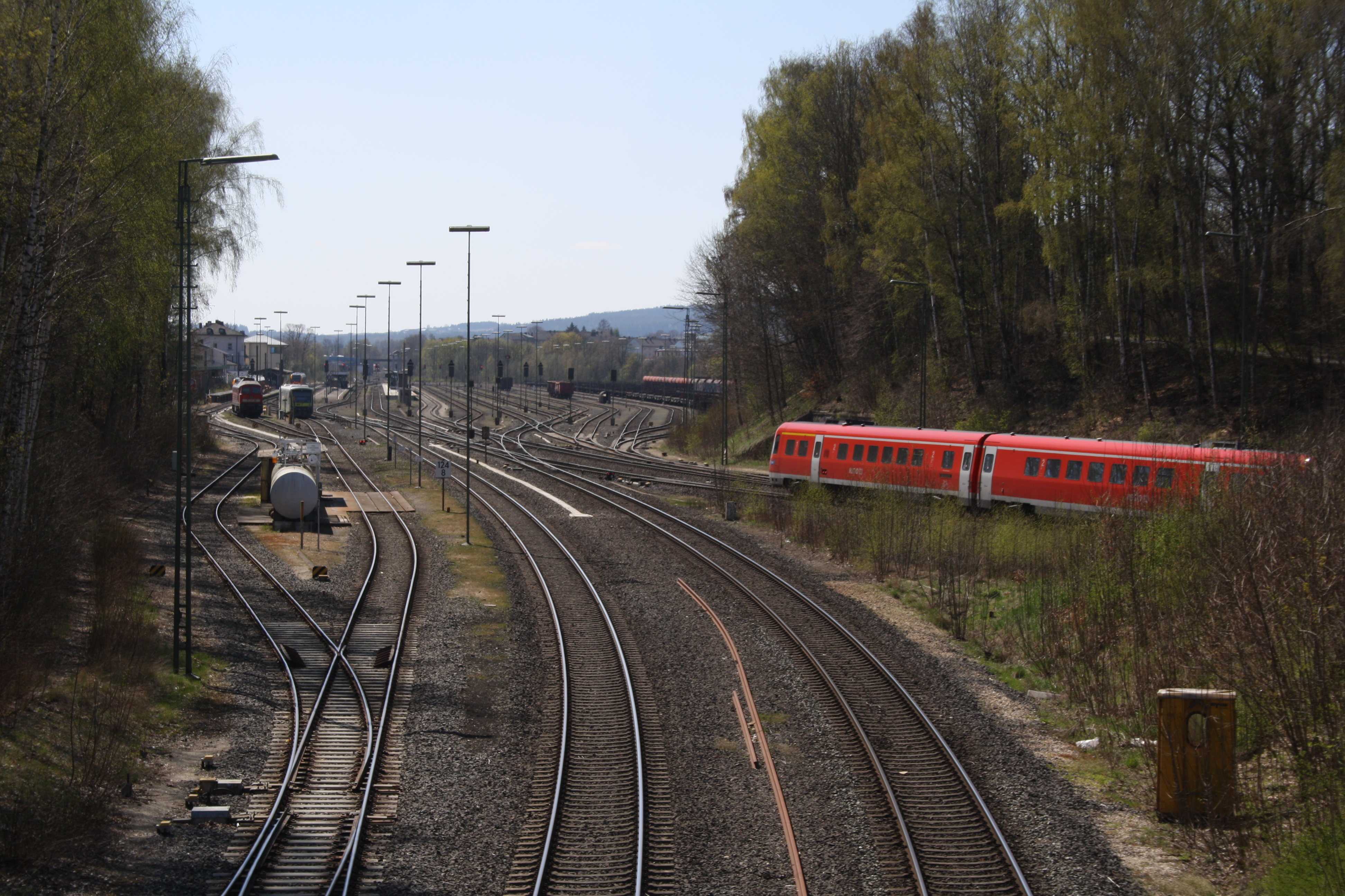 Bahnhof Marktredwitz, Strecke nach Cheb, rechts ein Zug Nach Hof (Saale)